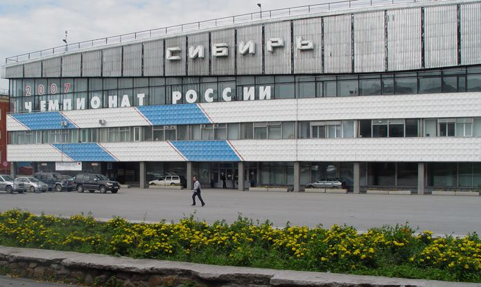 Sibir Sport Palase, Novosibirsk